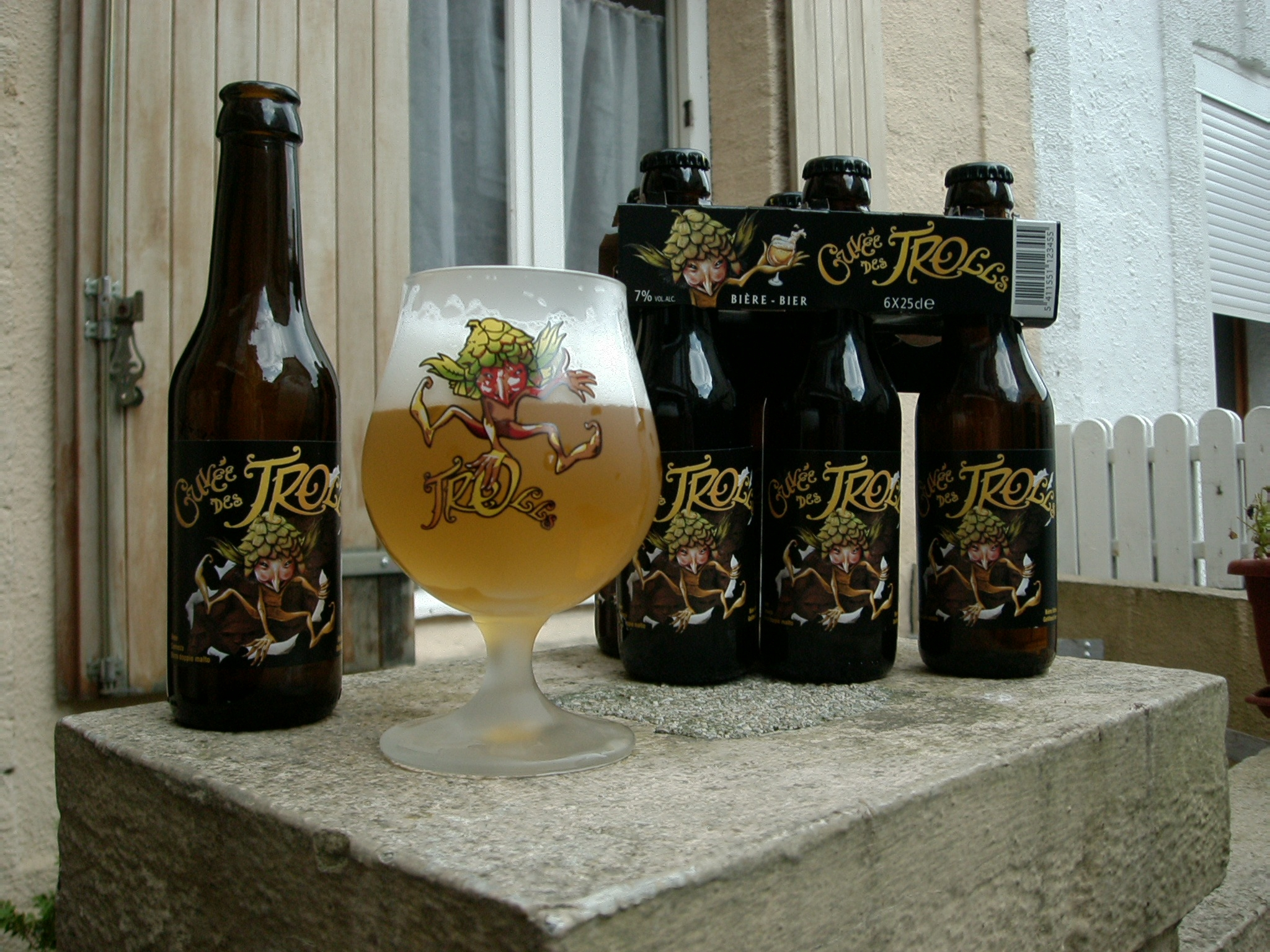 Belgisches Bier: Trolls Datum: 04.05.2011 Urheber: M. Pfeiffer alias Gordito1869 Quelle: privates Fotoarchiv des Urhebers